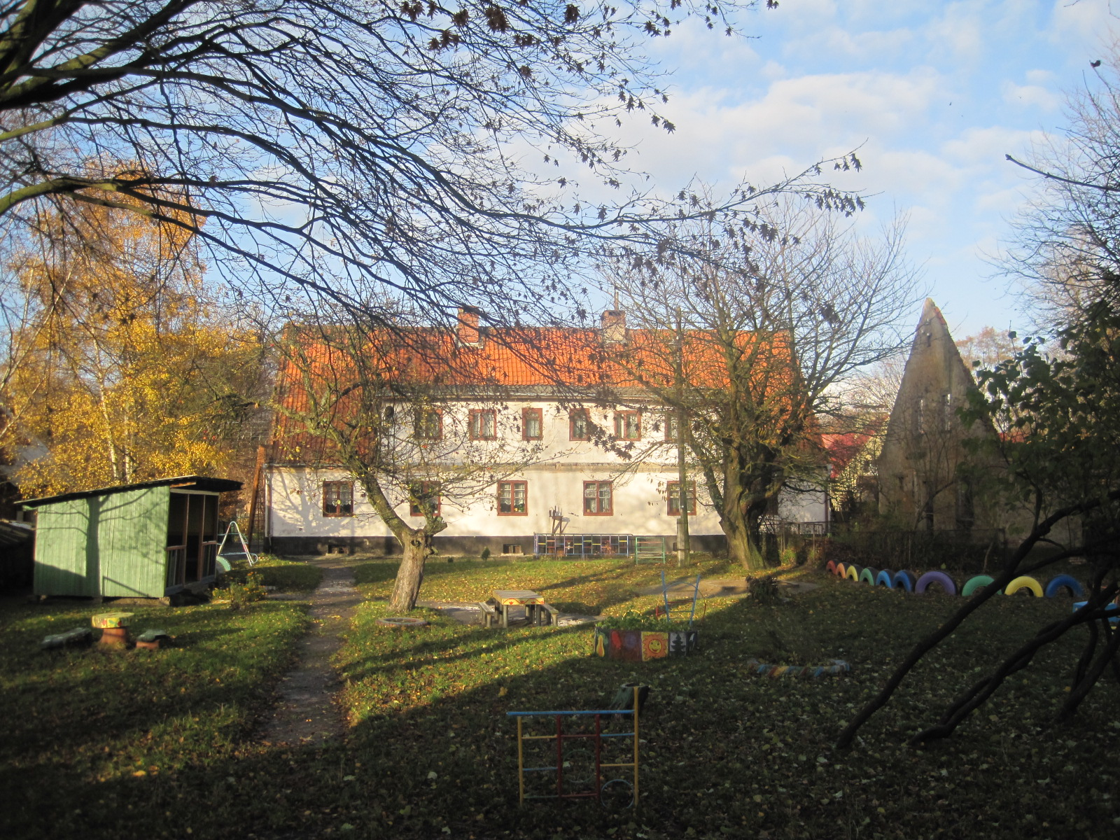 Детский сад "Звёздочка" в Донском